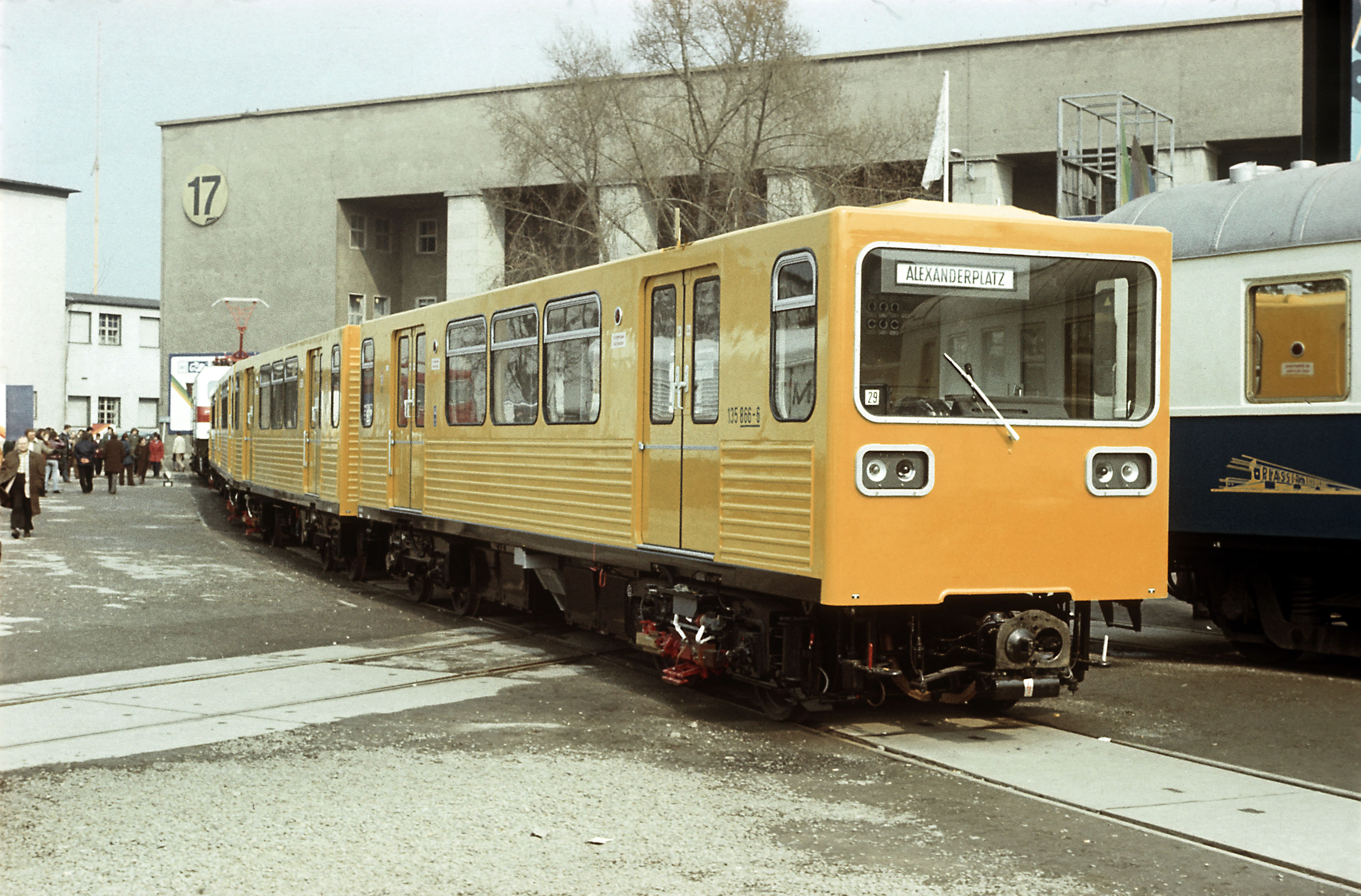 GI-Triebzug, Serienlieferung, Leipziger Frühjahrsmesse 1982